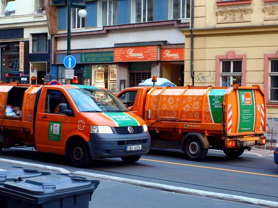 Vozy Pražských služeb a.s.